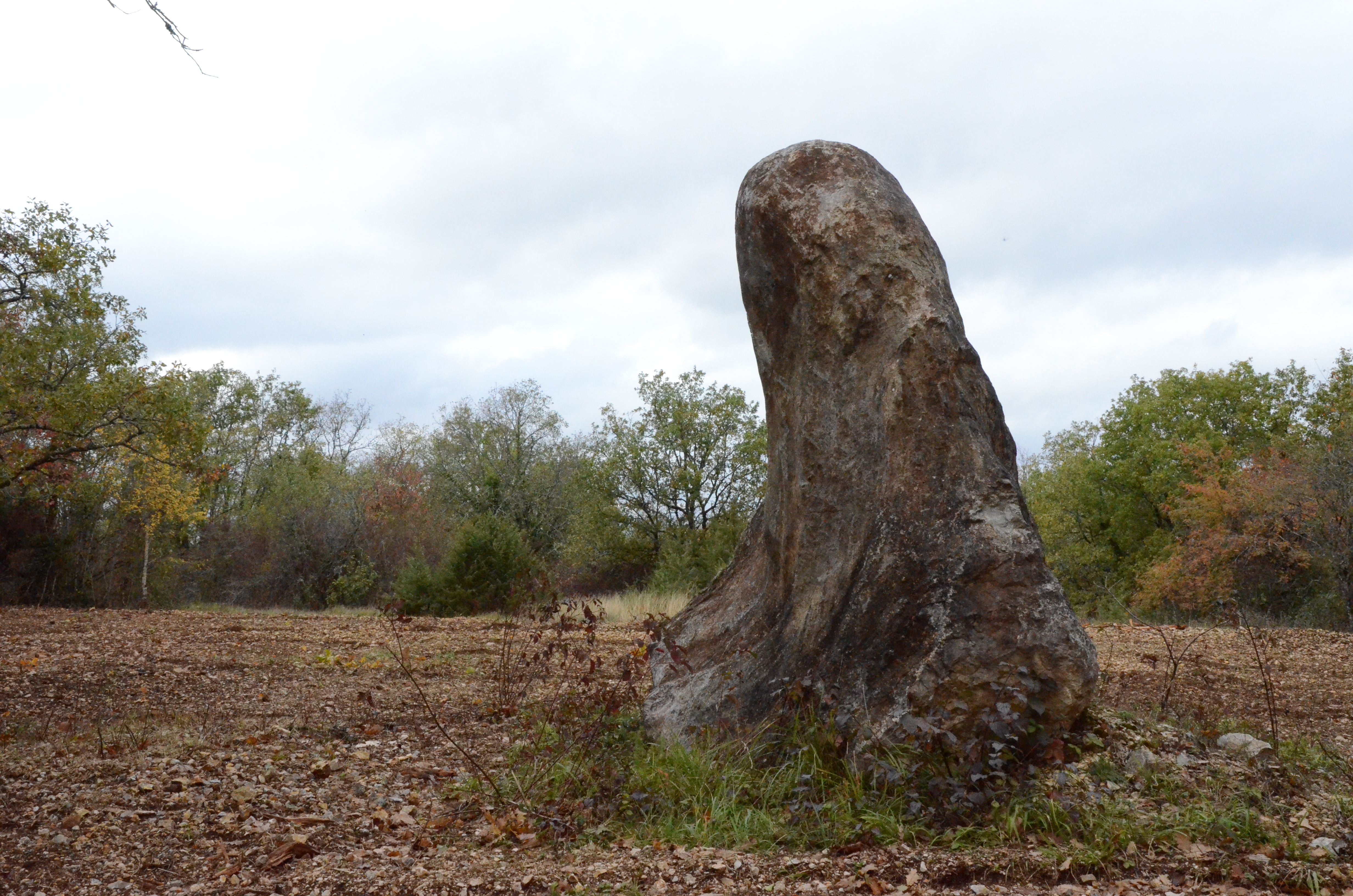 Cette pierre est située au point de jonction des diocèses de Cahors, Périgueux Sarlat et Tulle.